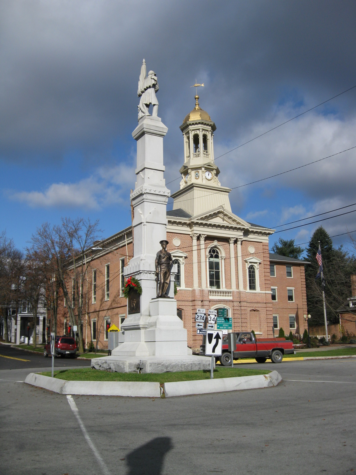 New Bloomfield, Pennsylvania